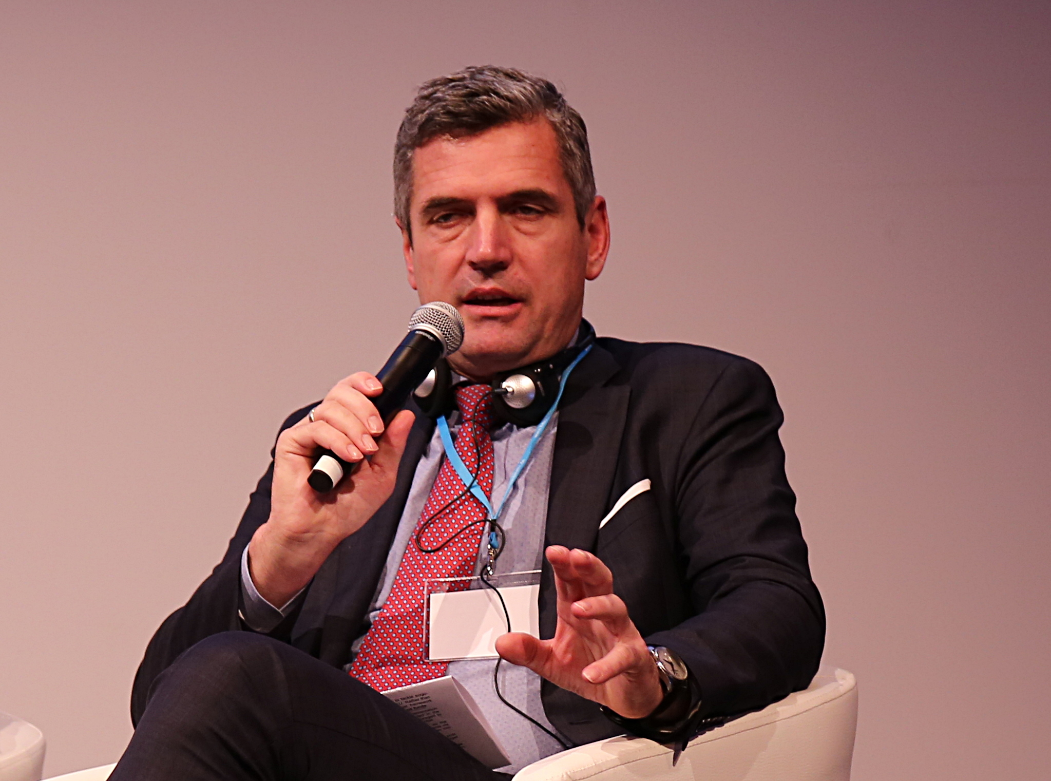 Herbert Dorfmann, MdEP, bei der EUSALP-Jahreskonferenz in München, 32./24. November 2017